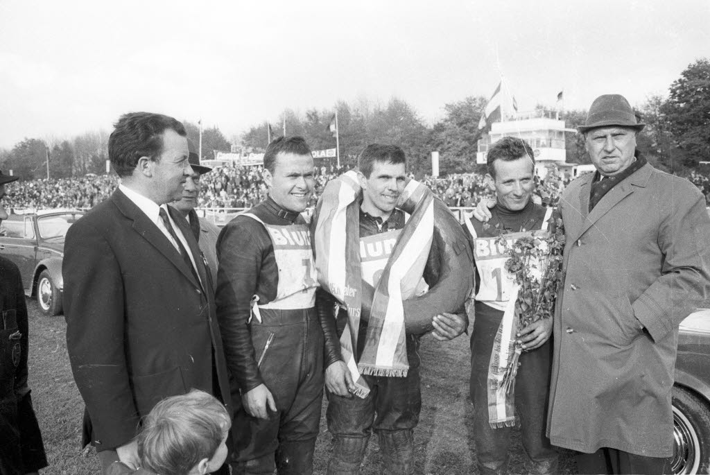 Siegerehrung. Im Bild u.a. Rennfahrer Jan Käter (3.v.r.) und der 1. Vorsitzender des Motorsportclub Nordmark. Hermann David (1.v.r.)